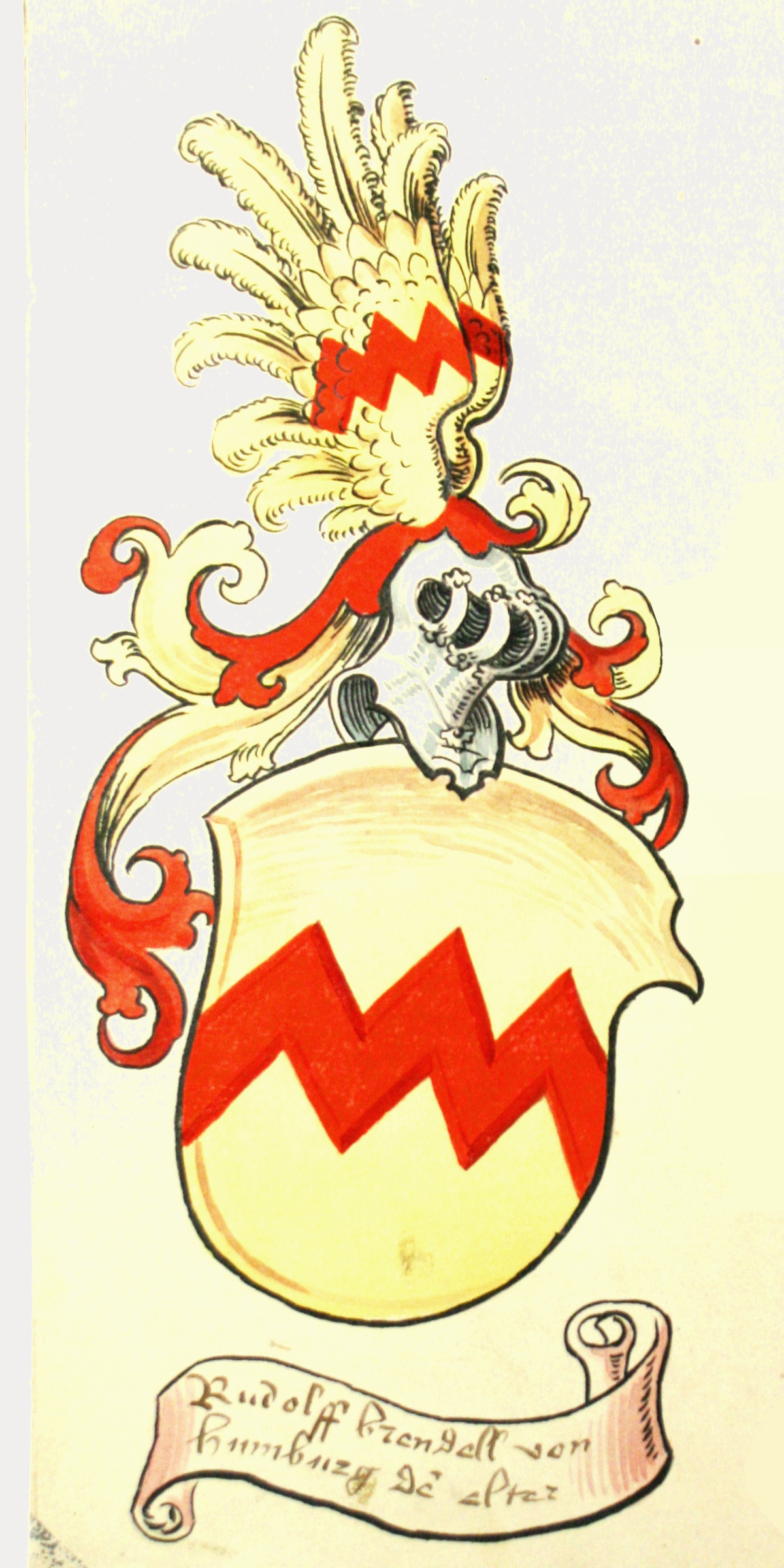 Wappen des Friedberger Burgmann Rudolf Brendel von Homburg im Salbuch des Kloster Naumburg, Buchmalerei des 16. Jahrhundert.